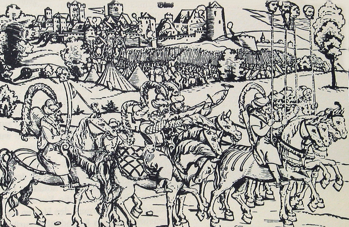 Belagerung von Güns 1532, Kupferstich